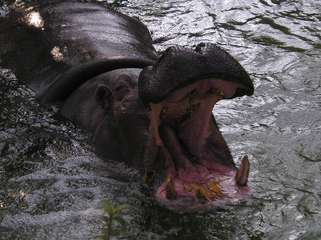 Ippopotamo Bioparco di Roma